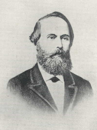 Bildnis des Physikers Wilhelm Holtz (1836–1913)